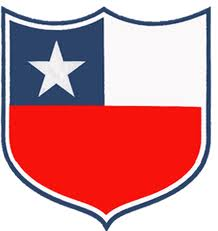 escudo usado por el campeon del futbol chileno